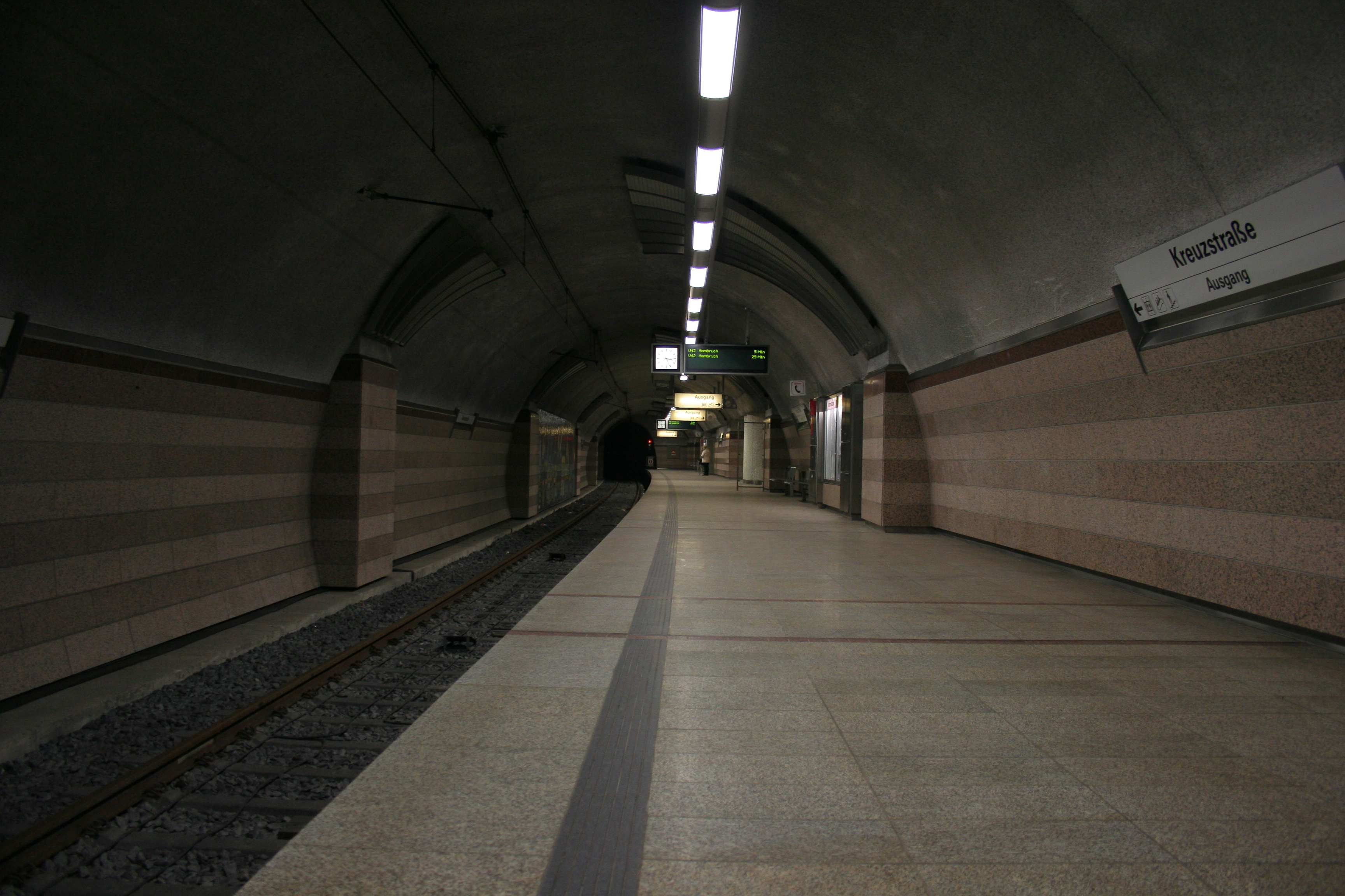 U-Bahnhof Kreuzstraße der Stadtbahn Dortmund